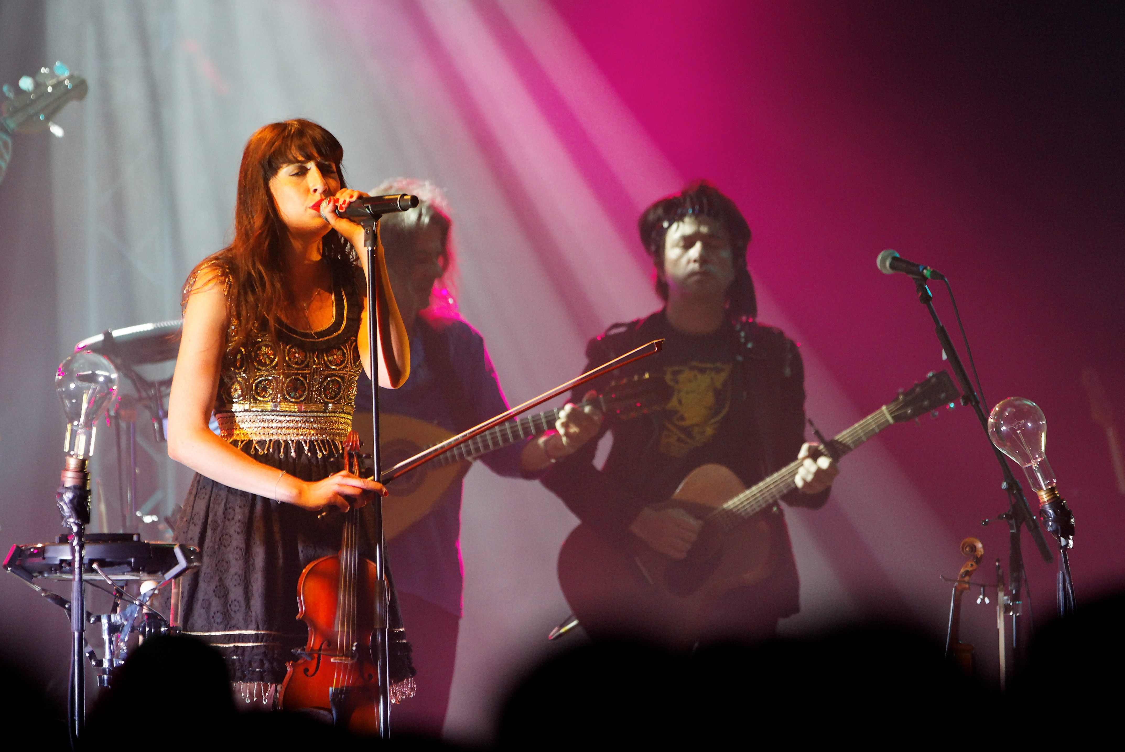 Nolwenn Leroy en concert le 22 juillet lors du festival de Cornouaille 2011.